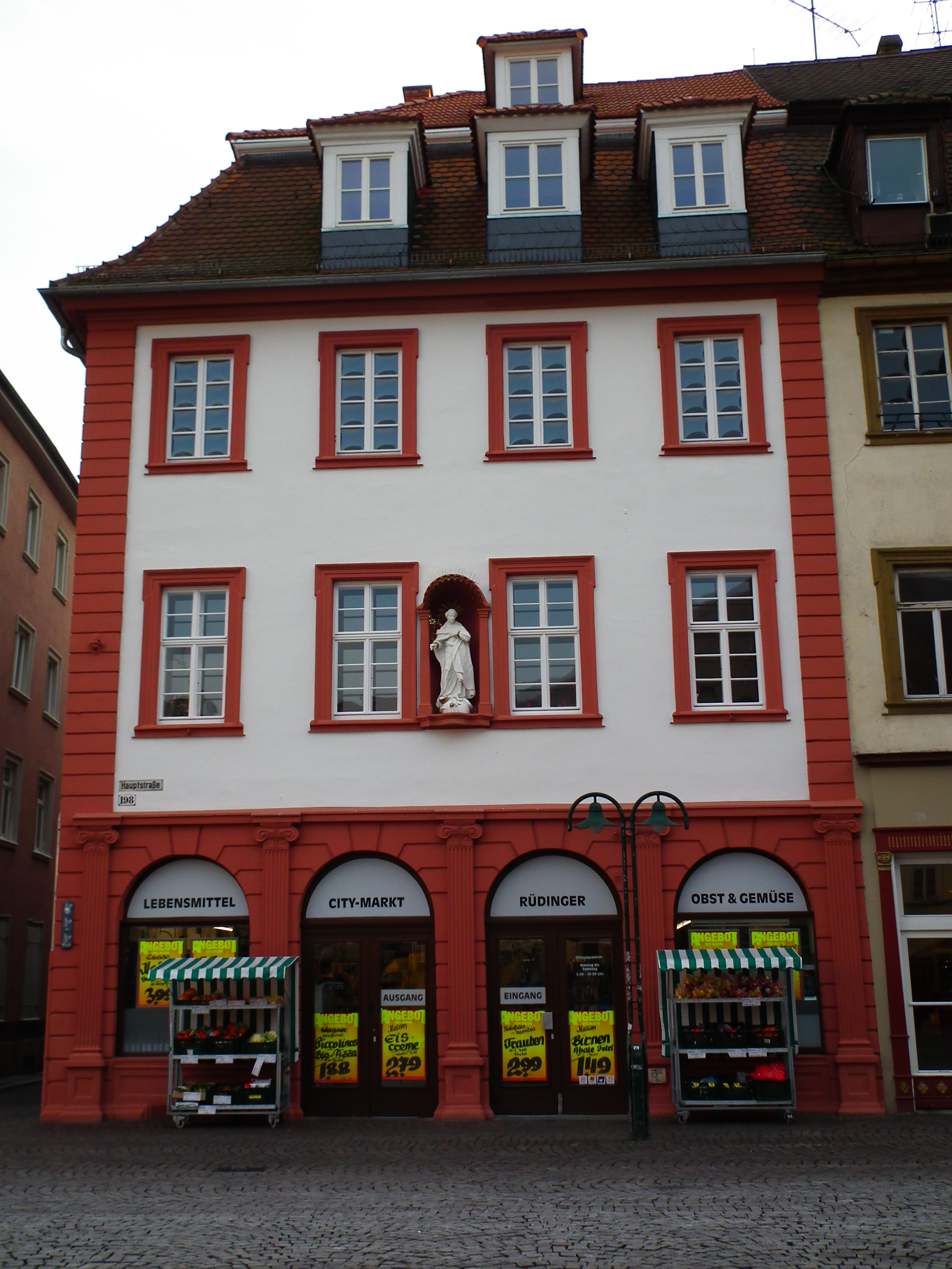 Wohn- und Geschäftshaus in der Hauptstraße 198 in der Heidelberger Altstadt (Baden-Württemberg, Deutschland)